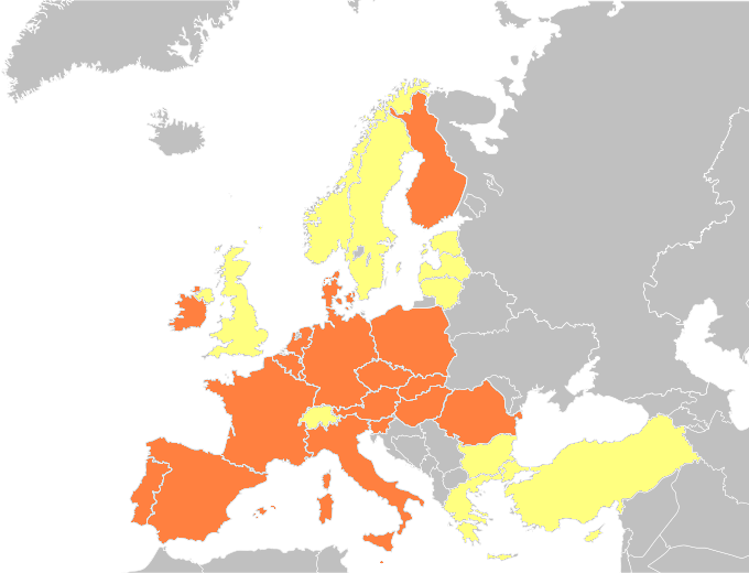 Mapa krajów, w których działa GLS; kolorem pomarańczowym zaznacznone są kraje, w których działają spółki - córki; żółtym - partnerzy.